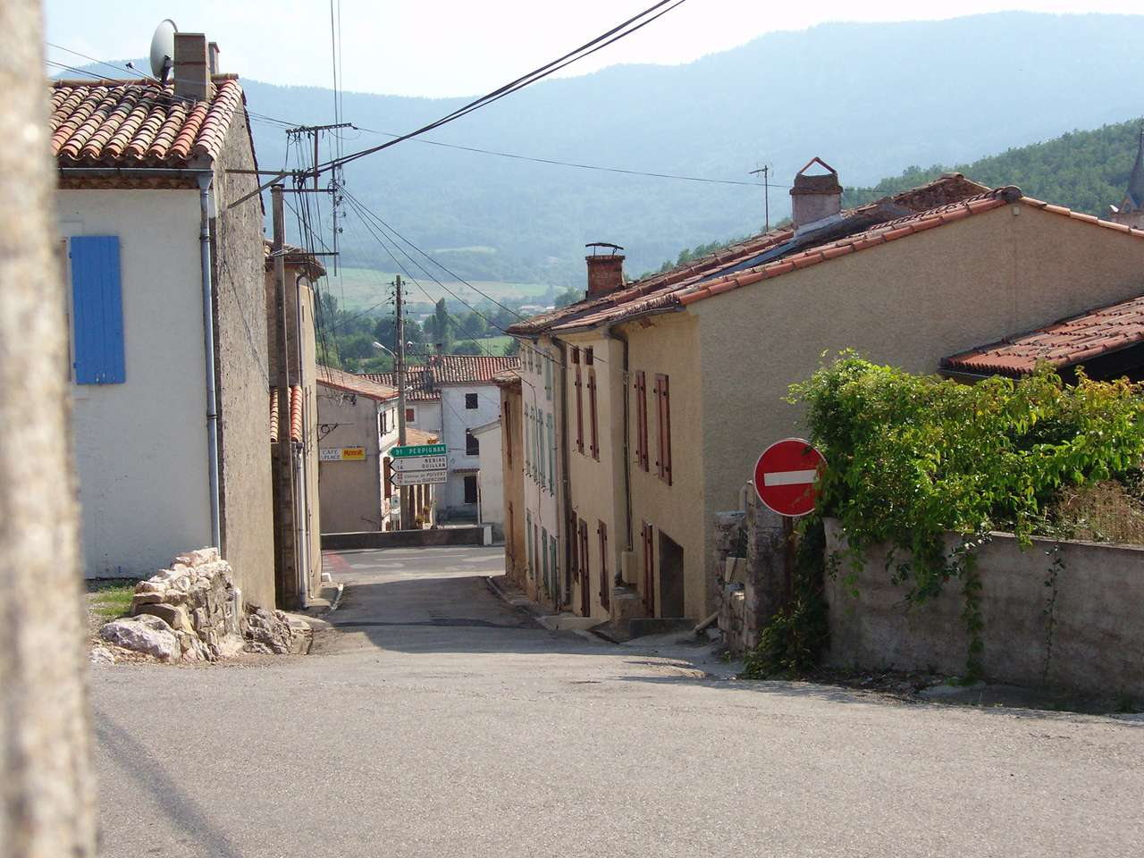 Puivert, delicate traffic problem